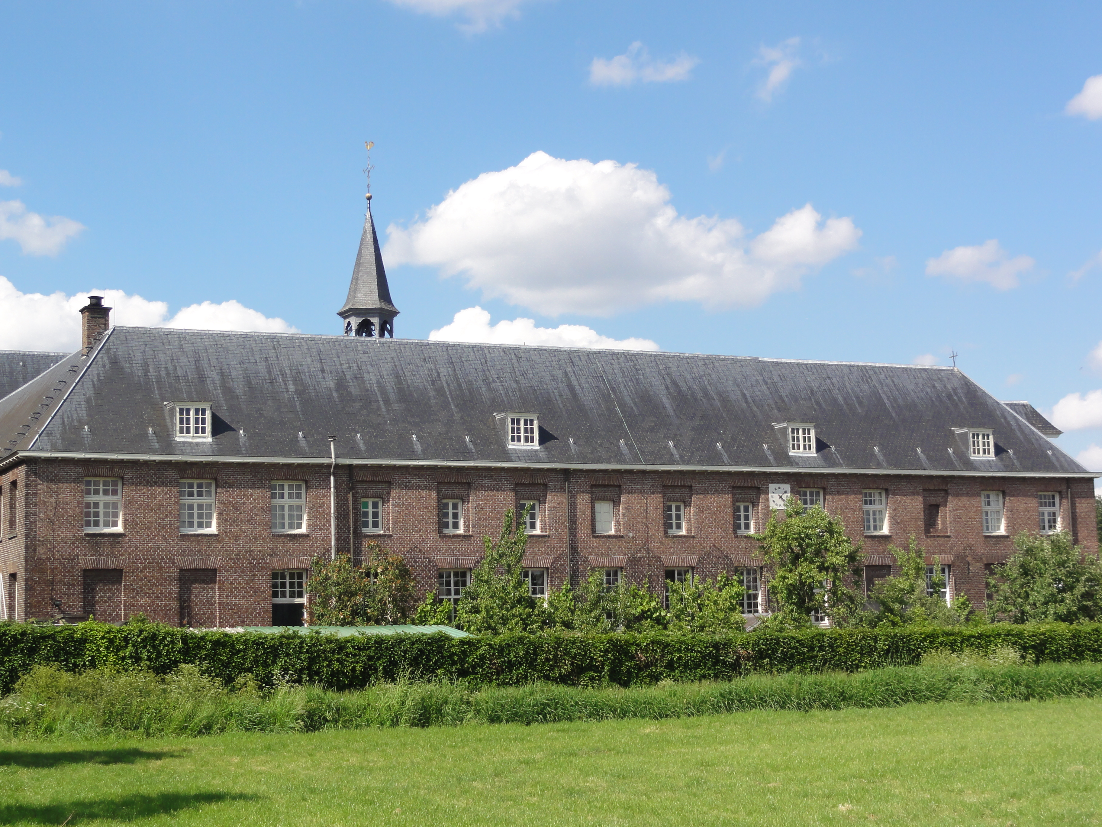 Handel (Gemert-Bakel)